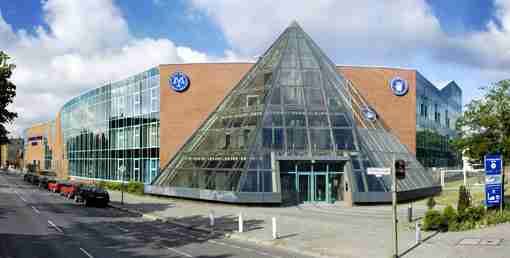 Staatliche Münze Berlin - Aussenansicht